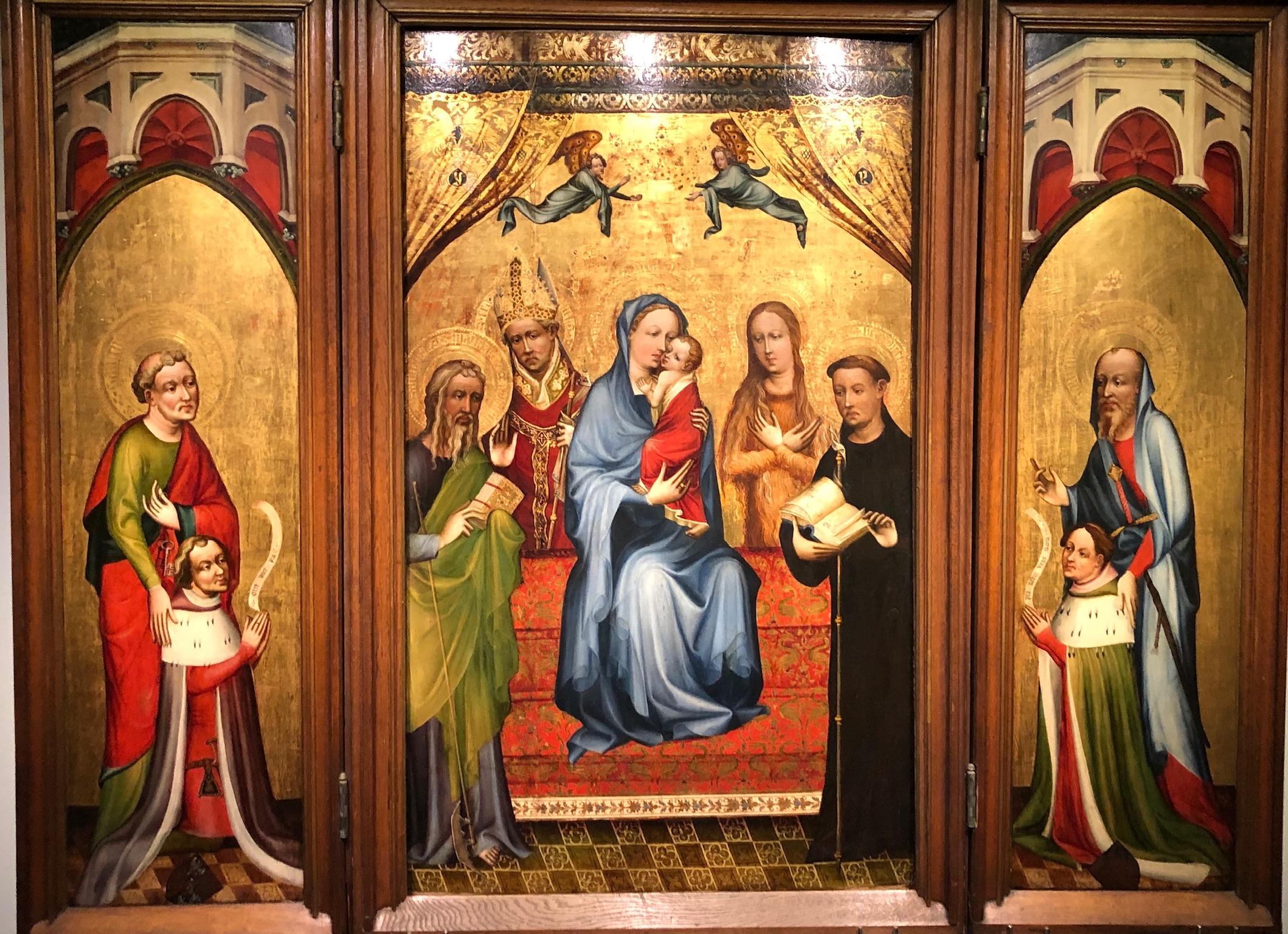 Falkensteinaltar in der Domschatzkammer in Aachen